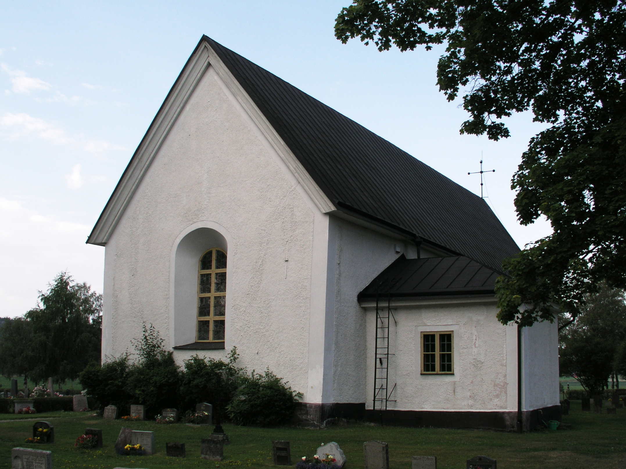 Högs kyrka, Diocese of Uppsala, Hudiksvall